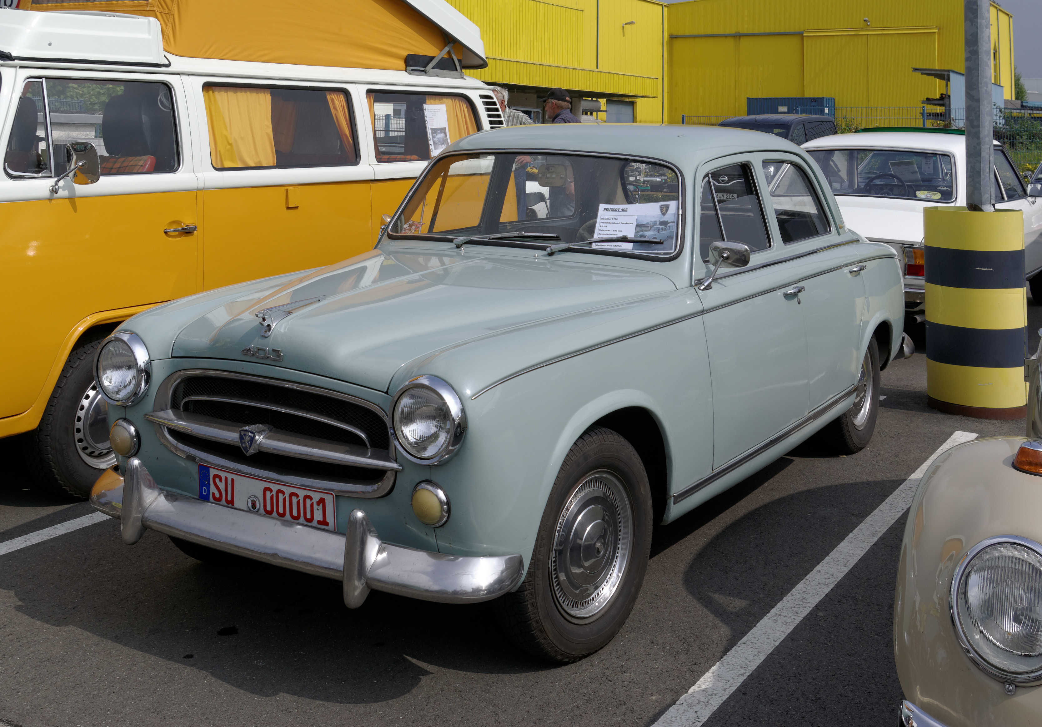 Peugeot 403, Baujahr 1958, 56 PS, 1500cm³ Bitburg Classic 2014 Das Nummernschild ist verfälscht!